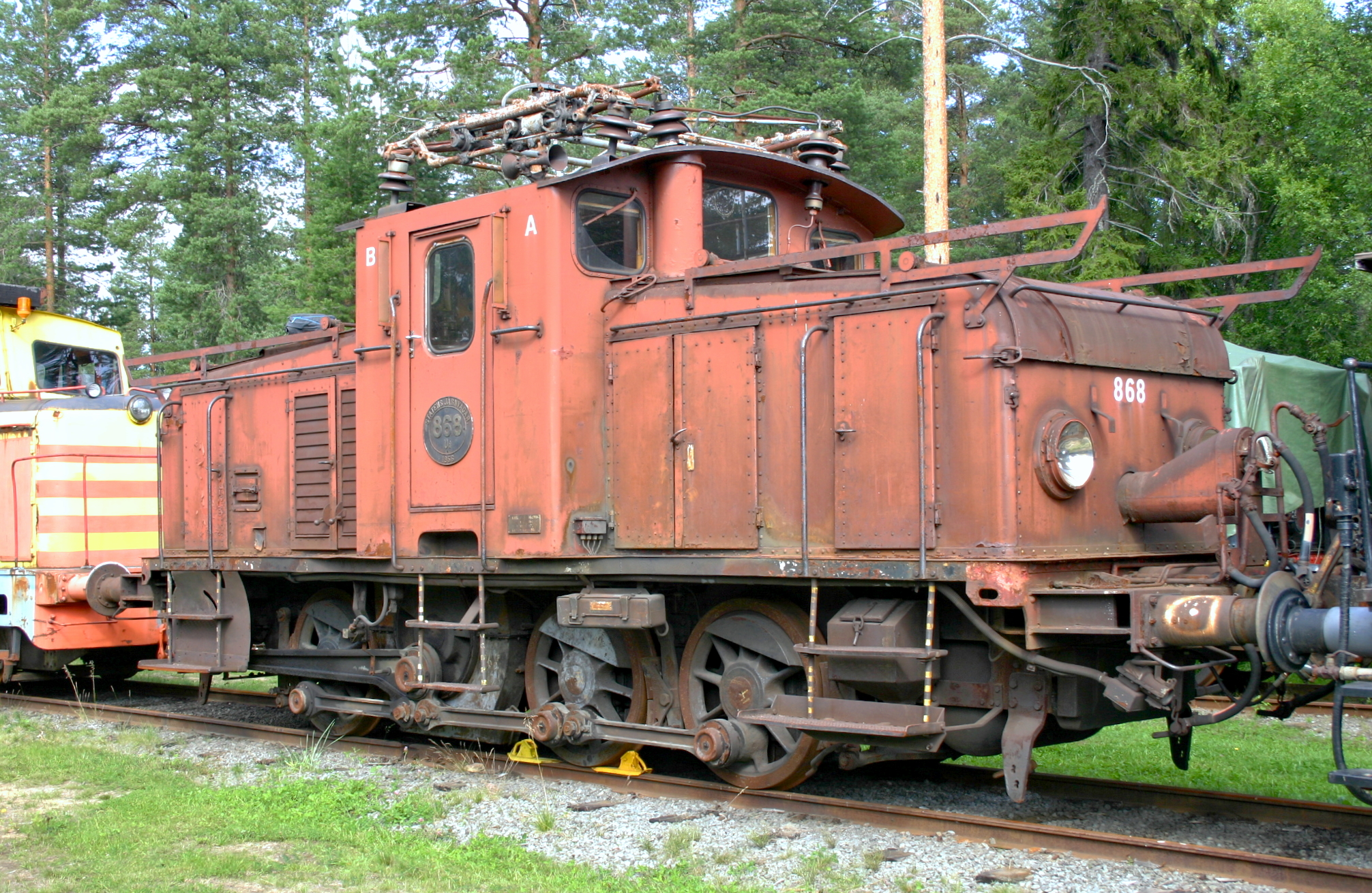 El-Lokomotive Ud 868 Luleå 12.08.04